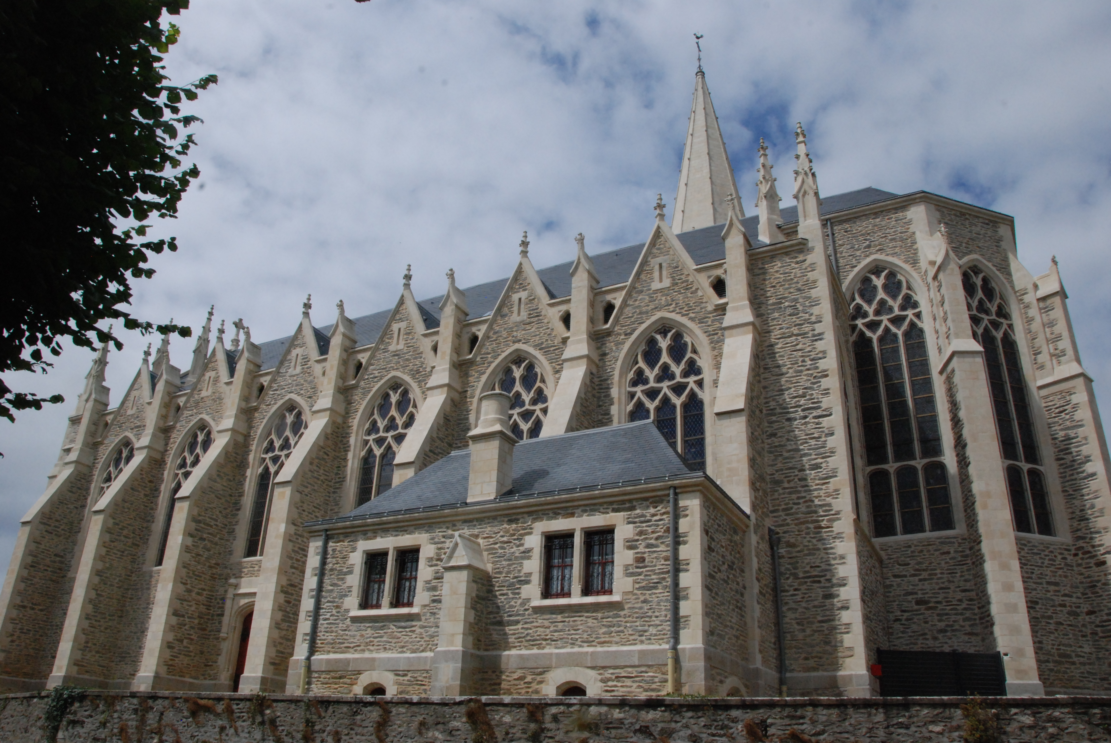 Eglise de Saint-Cyr-en-Retz